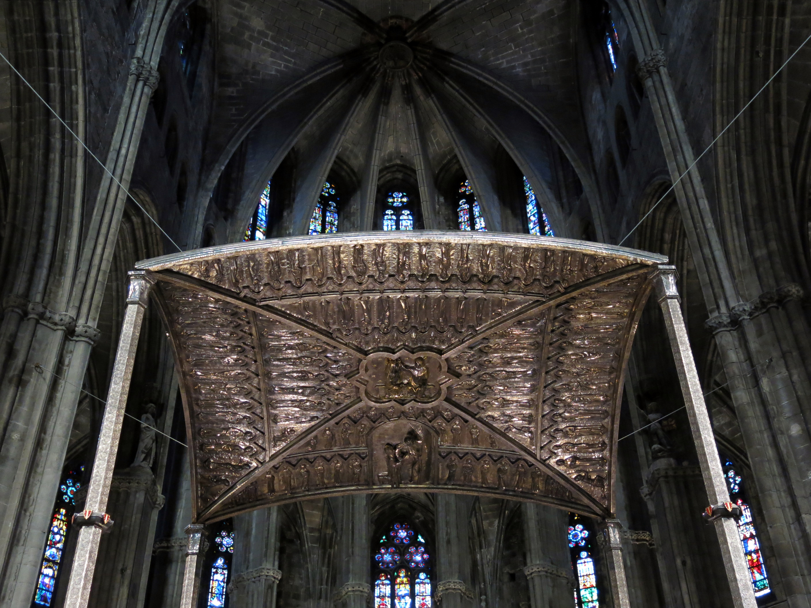 Catedral de Santa Maria (Girona)